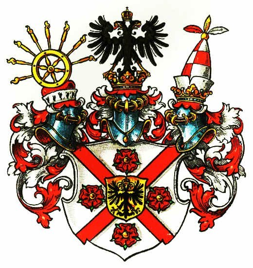 Wappen der Reichsfreiherren von Canitz (erbl. röm.-dt. Reichsfreiherrenwürde für den kurfstl. brandenbg. Geheimen Rat Friedrich Rudolph Ludwig v. Canitz (unter Berücksichtigung und Erwähnung, dass der (dann 1788 erloschenen) schlesischen Linie des Kaiserl. Geheimen Rats Melchior Friedrich von Canitz und Dallwitz bereits am 19. März 1664 zu Regensburg der böhm. erbliche Freiherrenstand erteilt wurde -auch der von der blühenden (d. h. nicht von Melchior Friedrich abstammenden) Linie von Canitz und Dallwitz seit Beginn des 19. Jahrhunderts geführte Freiherrentitel wurde in Preußen nicht beanstandet-) Wien 3. Januar 1698 (kurfstl. brandenbg. Anerkennung dessen 11. Februar 1698). Vgl. Genealog. Handbuch des Adels, Adelslexikon Band II, Band 58 der Gesamtreihe, Limburg/L. 1974, S. 227. Wortlaut der Erhebung in den Reichsfreiherrenstand von 1698 abgedruckt in: Johann Ulrich König, Des Freiherren [Friedrich Rudolf Ludwig] von Canitz Gedichte, mehrentheils aus seinen eigenhändigen Schrifften, 3. Aufl. Berlin und Leipzig 1750, S. 80-82 Digitalisat.